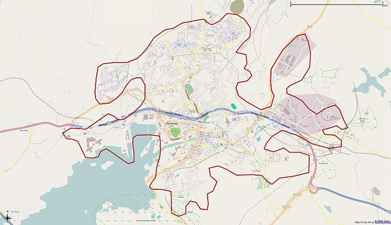 Tätorten Uddevallas gränser 1990 enligt Atlas över rikets indelningar 1992.